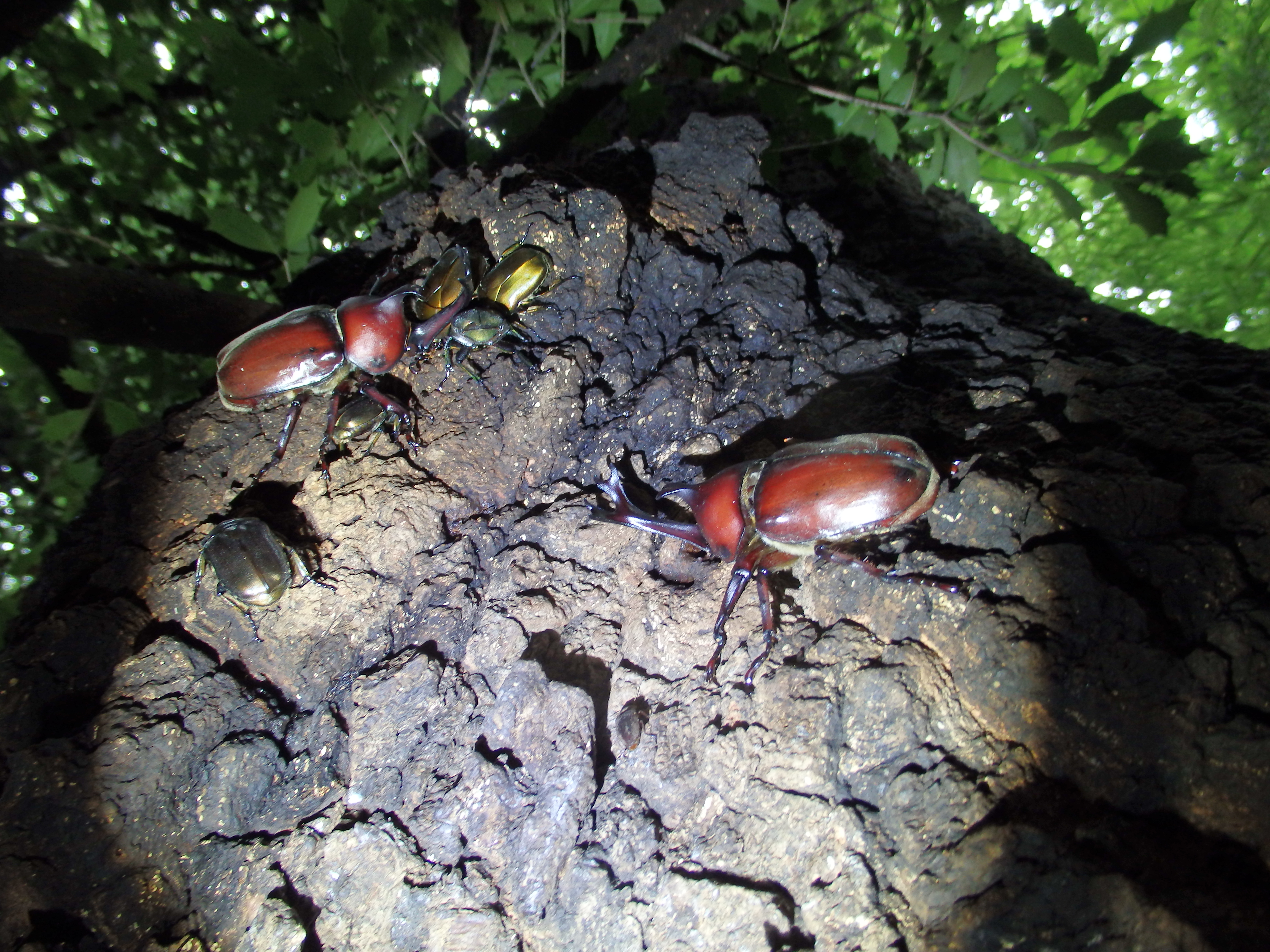 撮影地：東京23区